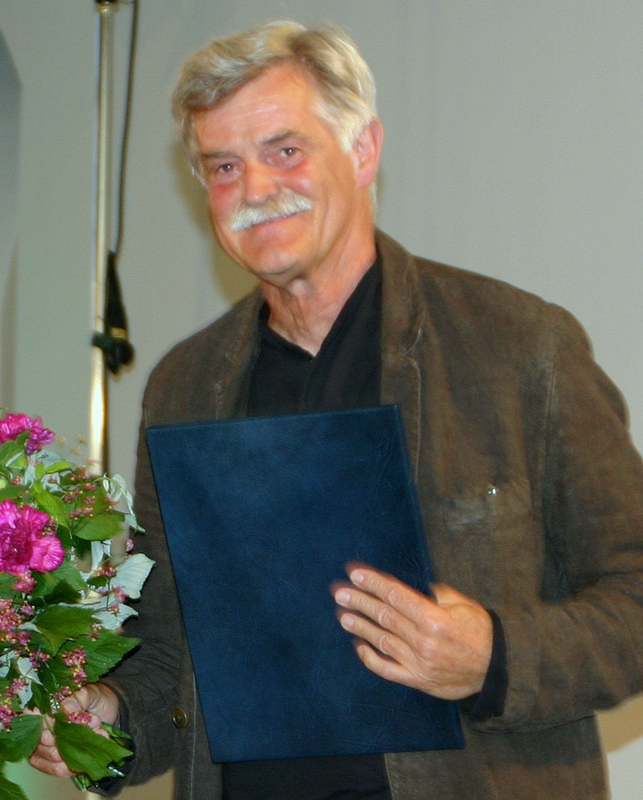 Titel des Werks: "Der Komponist Nikolaus Brass erhält am 29. Juli 2009 den Musikpreis der Landeshauptstadt München" Ort: Saal des Alten Rathauses in München. Es handelt sich um einen Ausschnitt aus der Originalaufnahme.